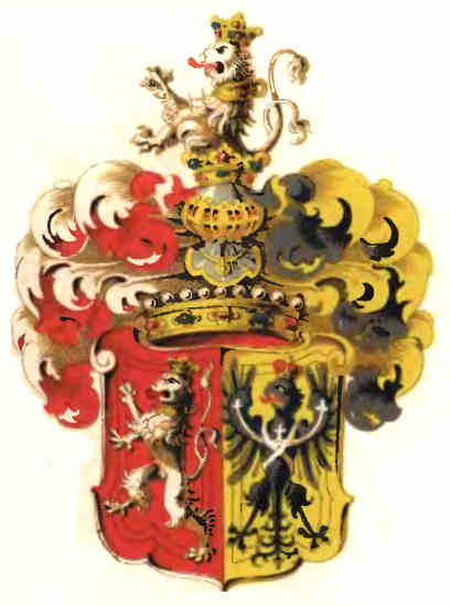 Wappen der Grafen von Burghauß (Grafenstand 1691)